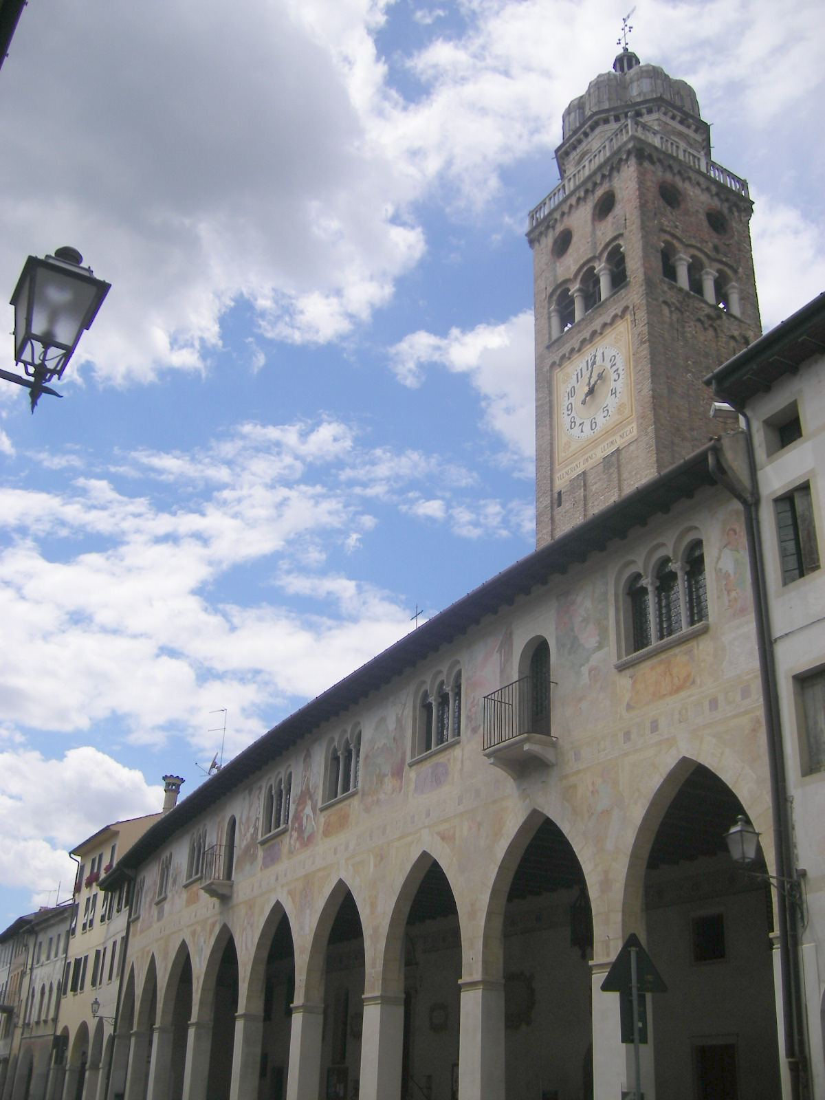 Conegliano